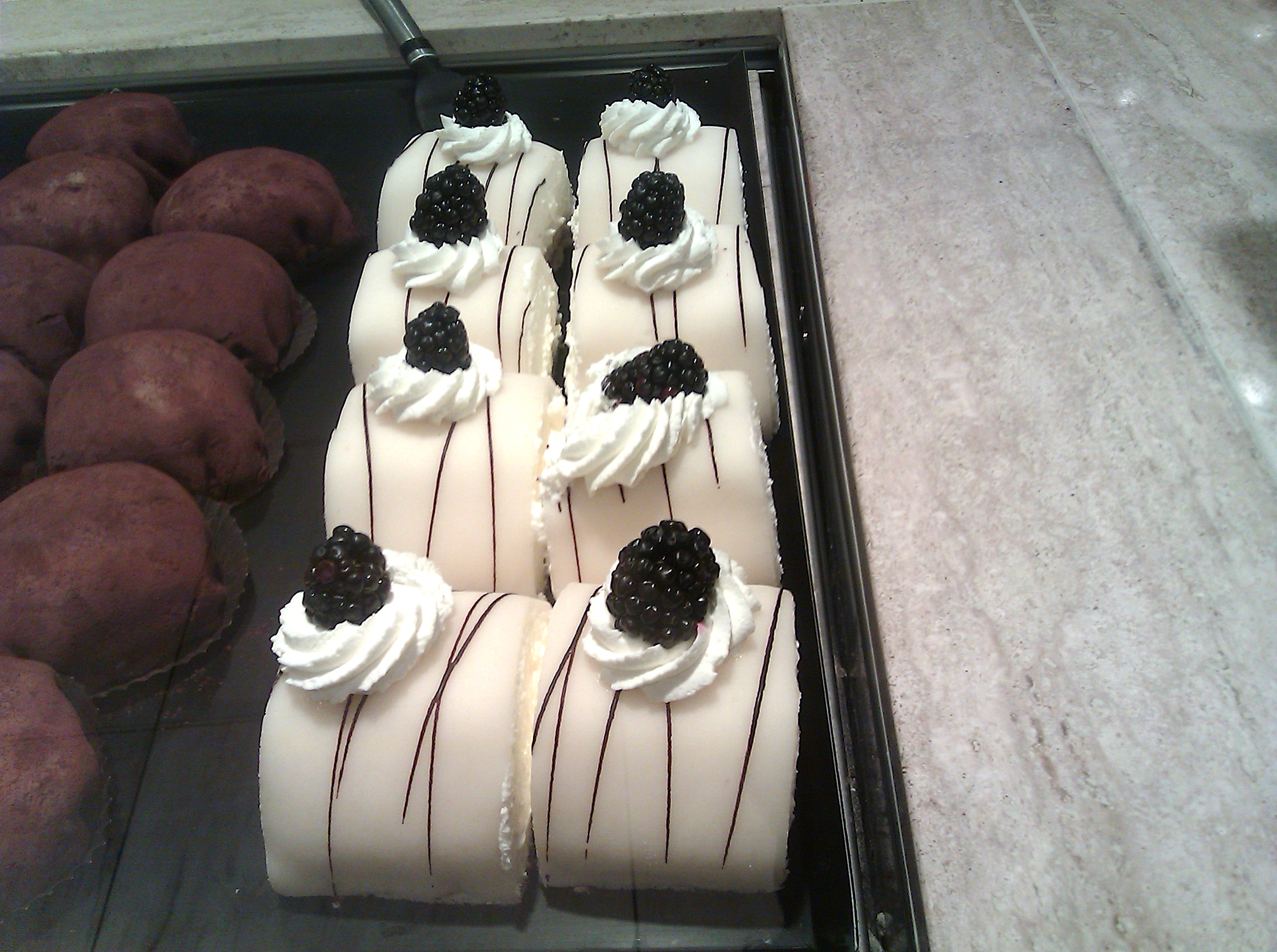 Gåsebryst med syltetøj, flødecreme og marcipan, Danmark